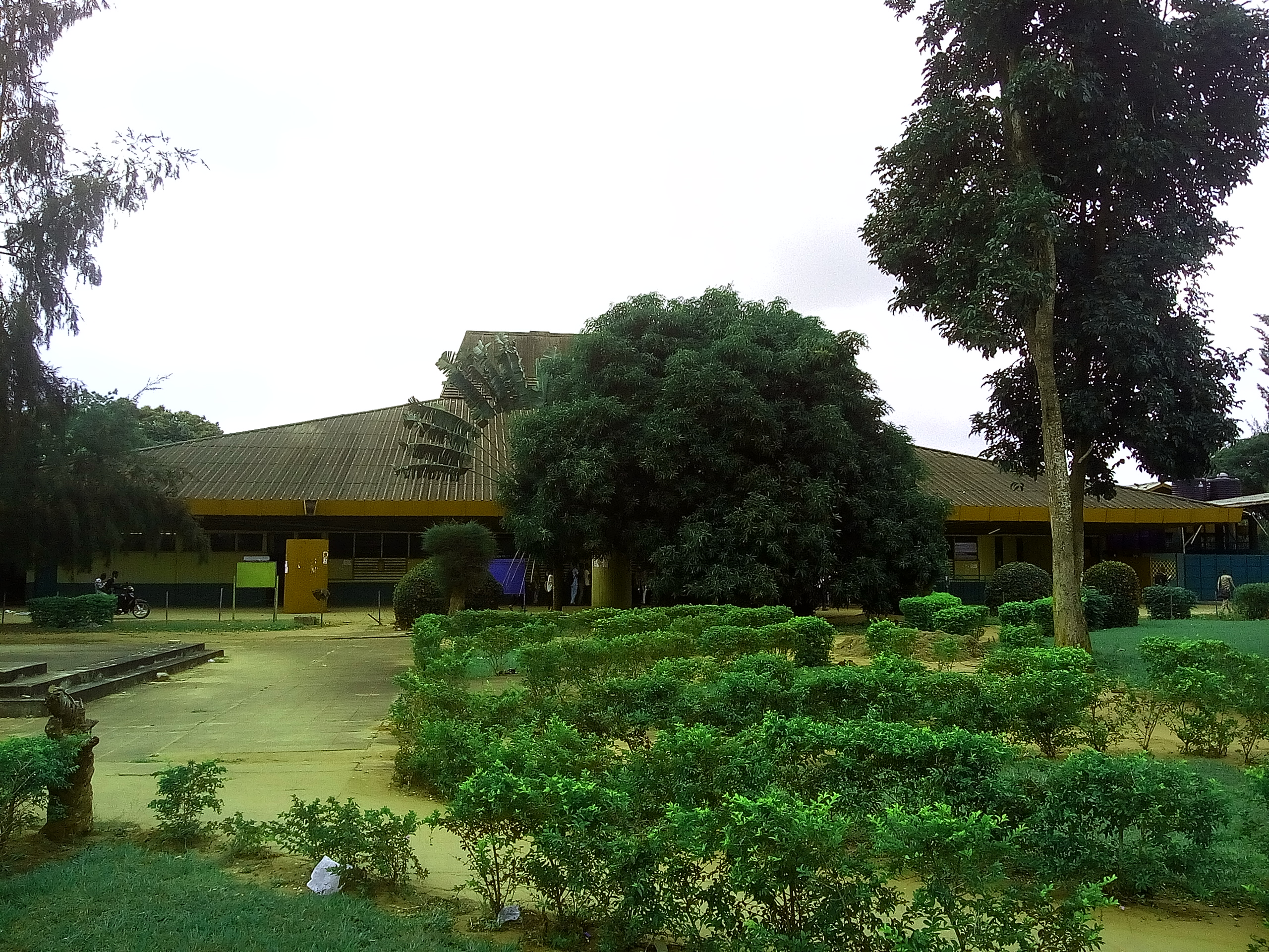 Bâtiment du resto-u